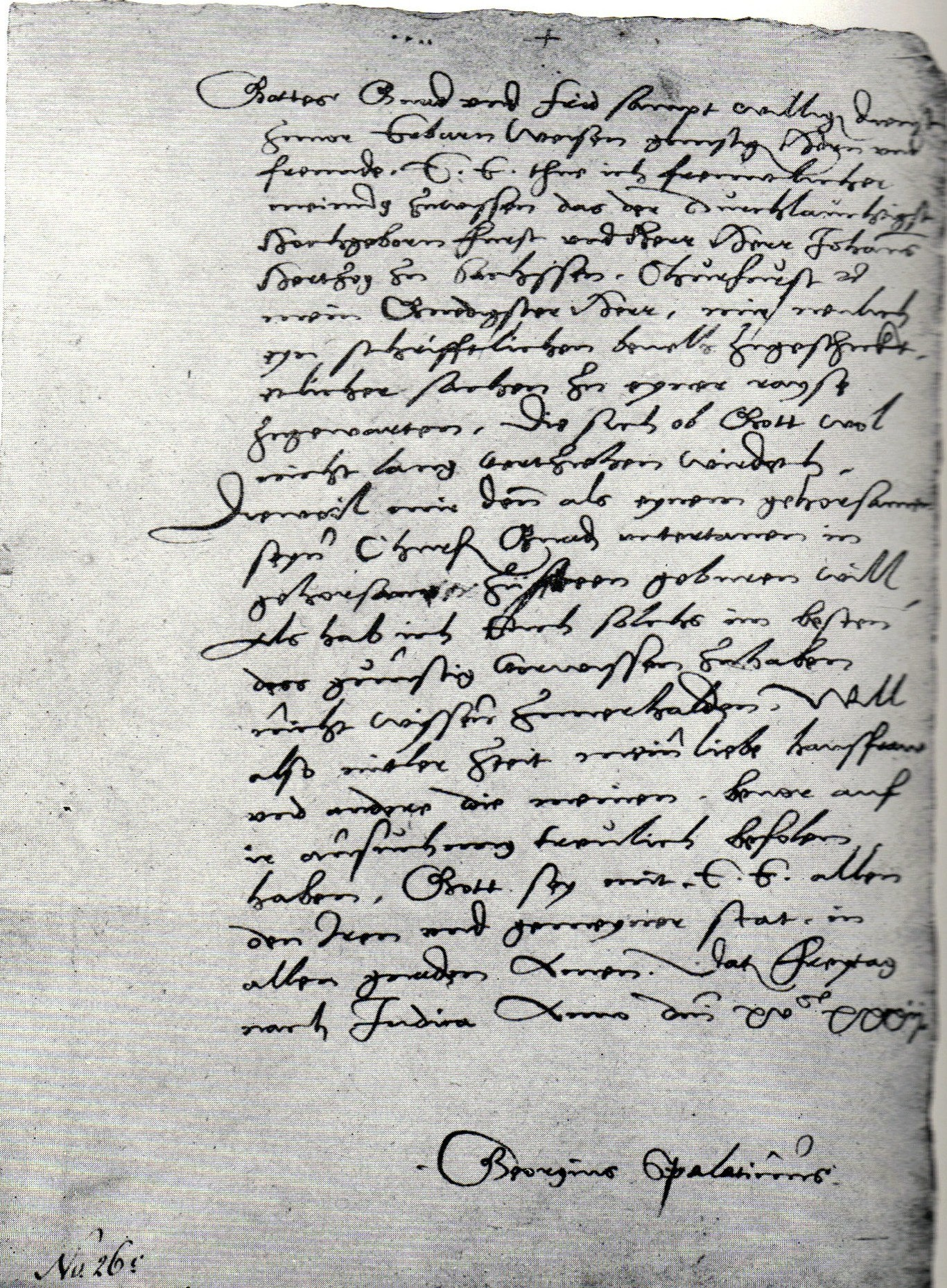 Schreiben Spalatins an Bürgermeister und Rat zu Altenburg vom 22. März 1532: Er müsse verreisen und empfiehlt dem Adressaten seine Familie, Ratsarchiv Altenburg XIV 10 Nr. 26c